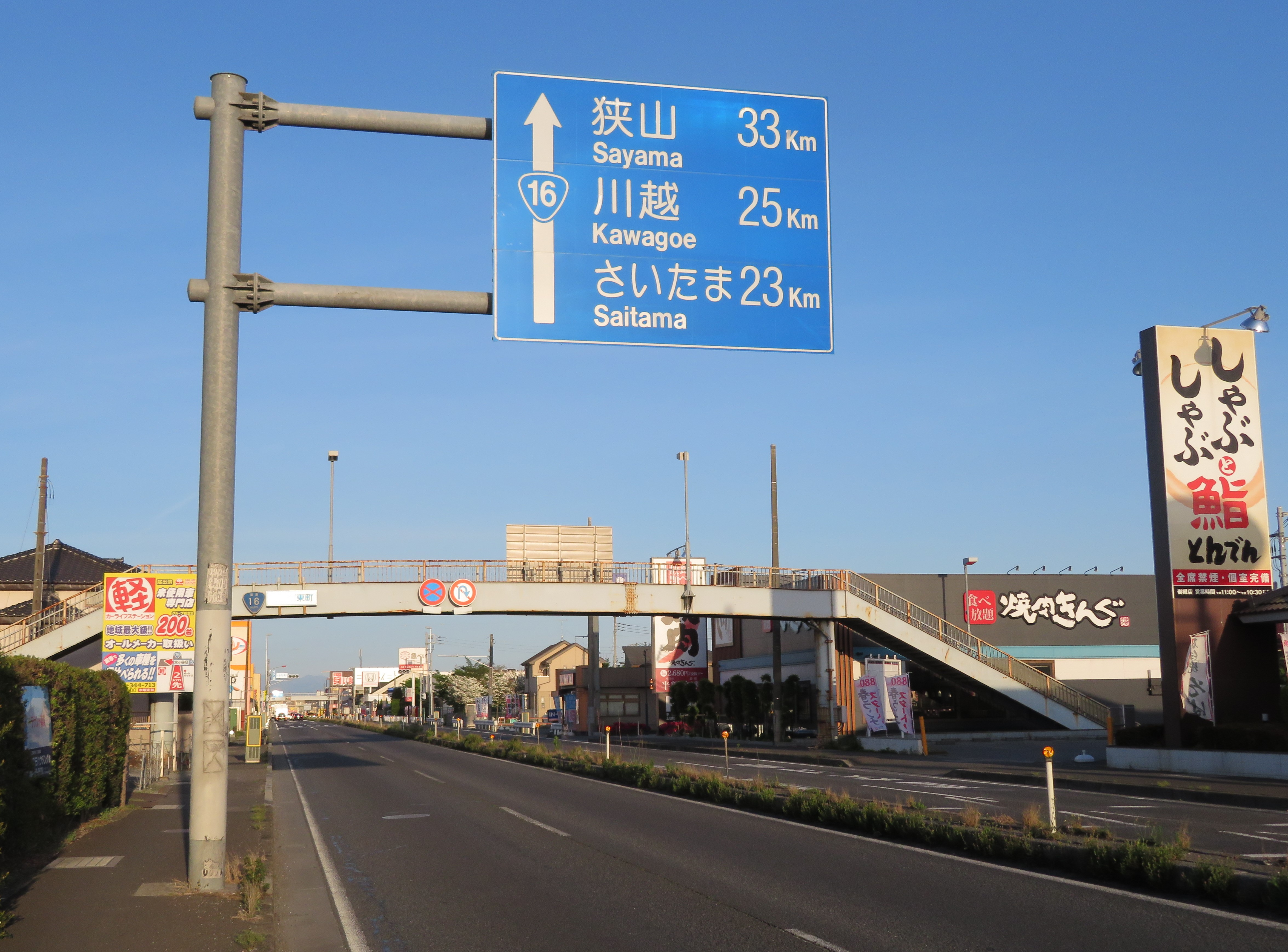 国道16号線 埼玉県さいたま市岩槻区城南一丁目付近（大宮方面を撮影） Canon PowerShot SX720 HS